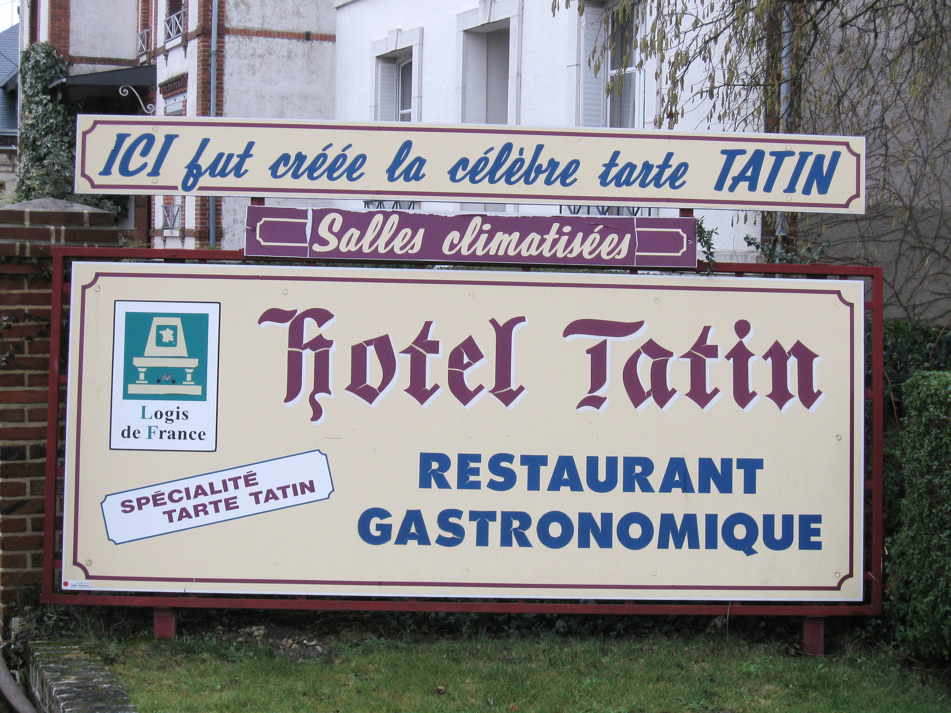 Hôtel-restaurant Tatin, Lamotte-Beuvron, Loir-et-Cher, France